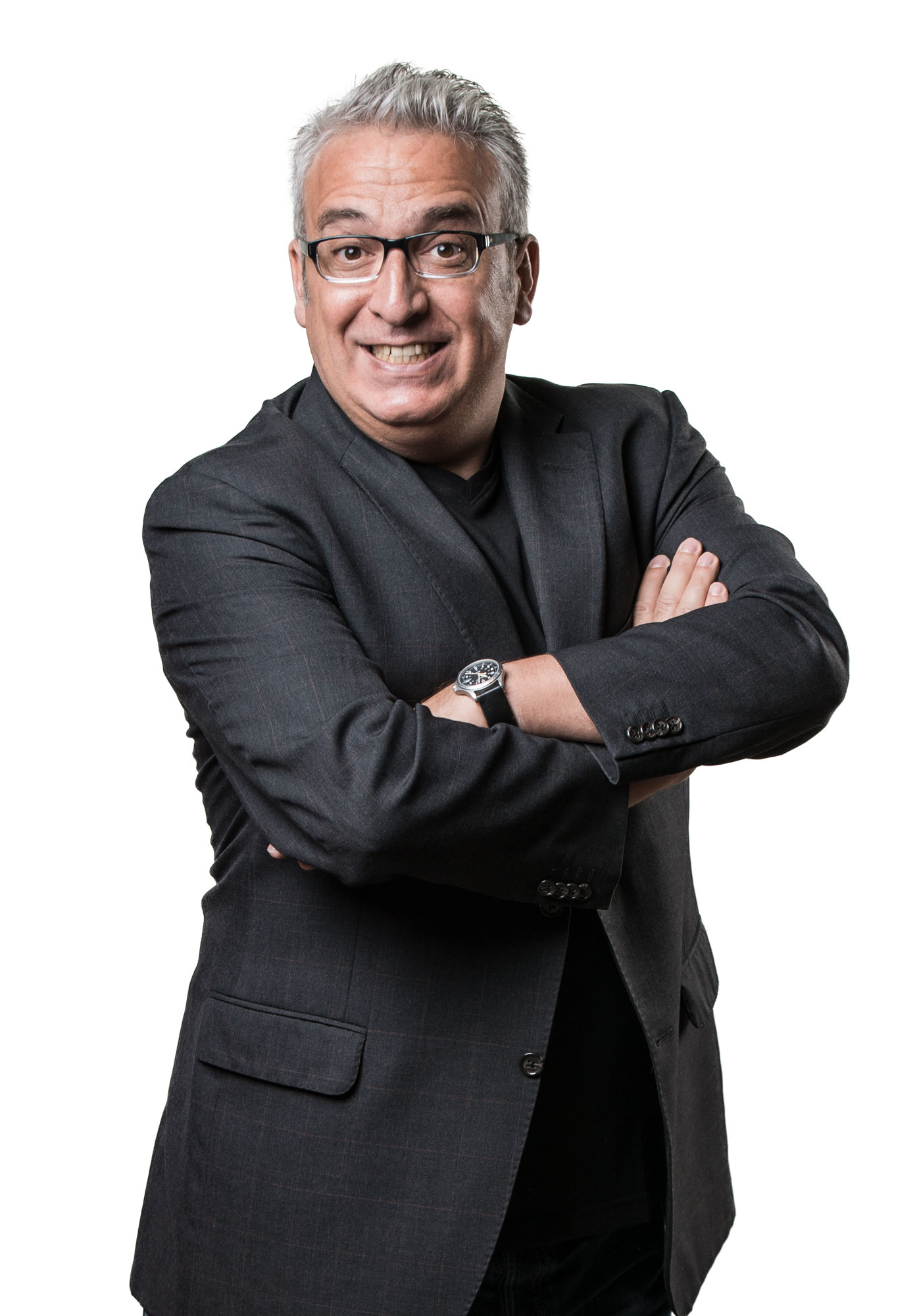 Fotografía de estudio del cómico español Leo Harlem